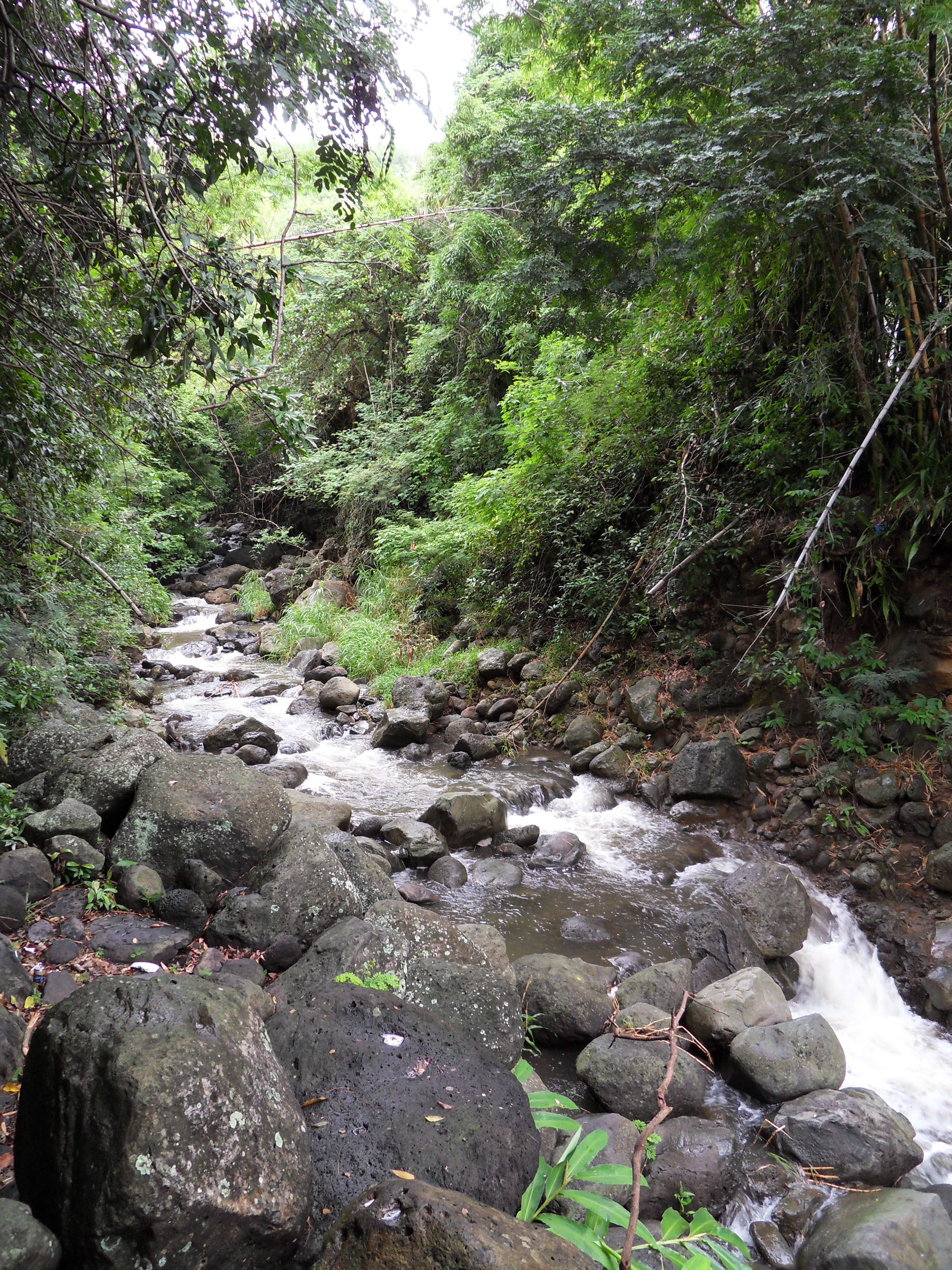 La Ravine du Butor au-dessus de sa partie canalisée, à l'extrémité de la Rue Saint-Joseph-Ouvrier, à Saint-Denis de La Réunion.